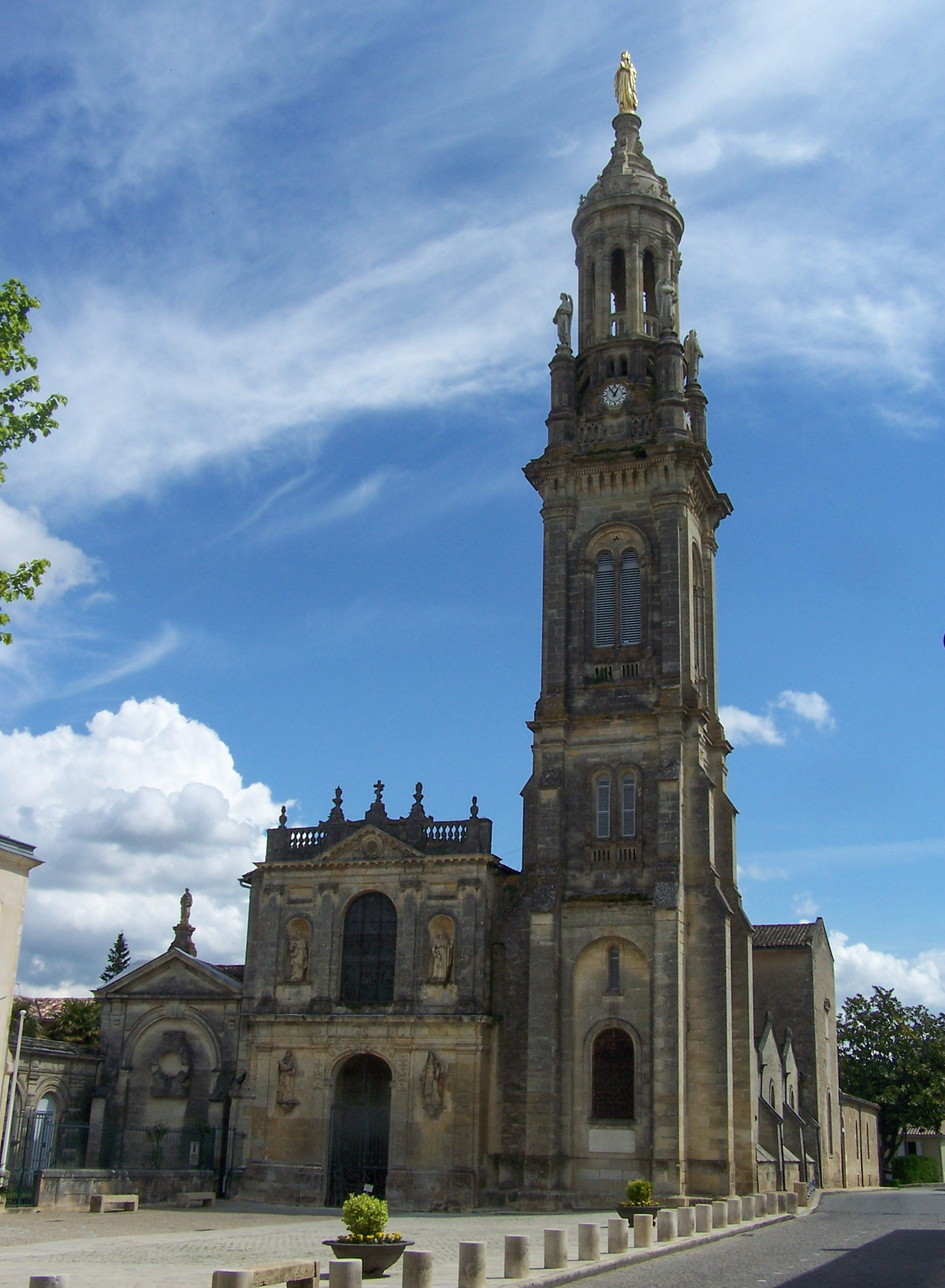 Basilique Notre Dame de Verdelais (Gironde, France)